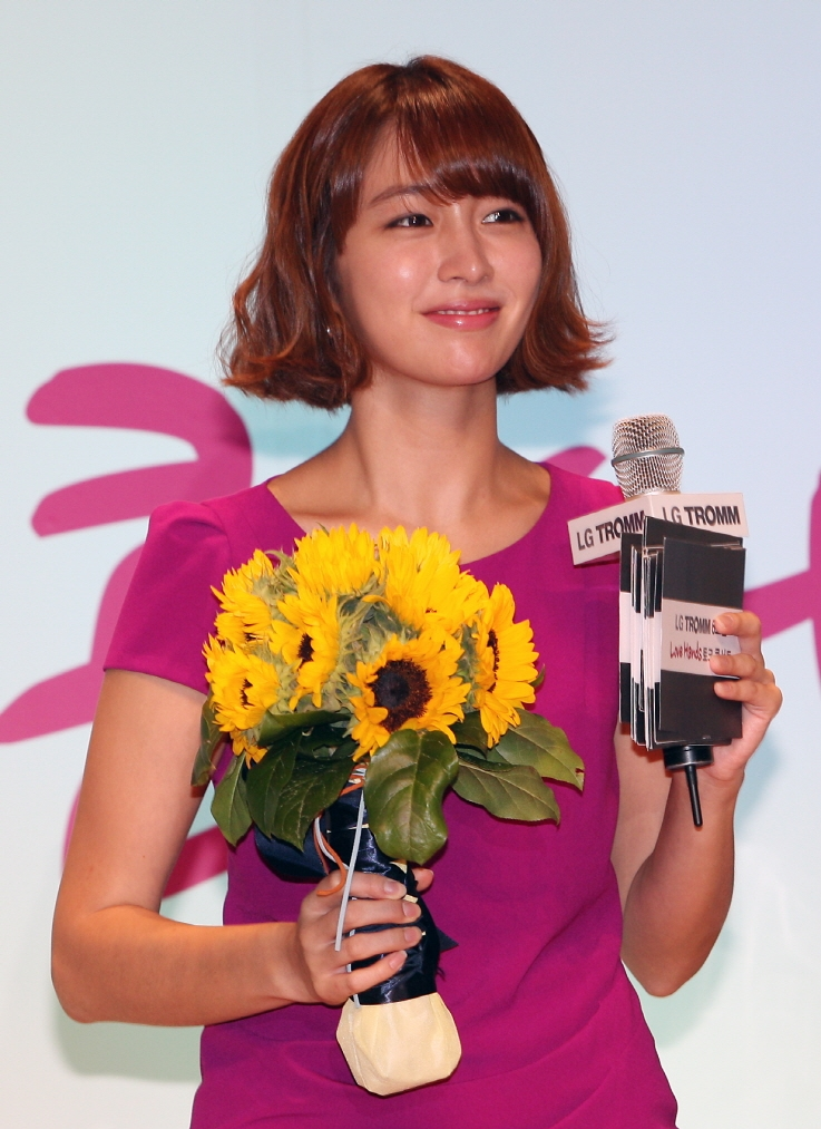 LG전자가 19일 서울 페럼타워에서 트롬 광고 모델 이민정과 함께하는 LG 트롬 러브핸즈 토크 콘서트’를 개최했다. ※ LG전자 뉴스룸 에서 관련 보도자료를 확인실 수 있습니다.